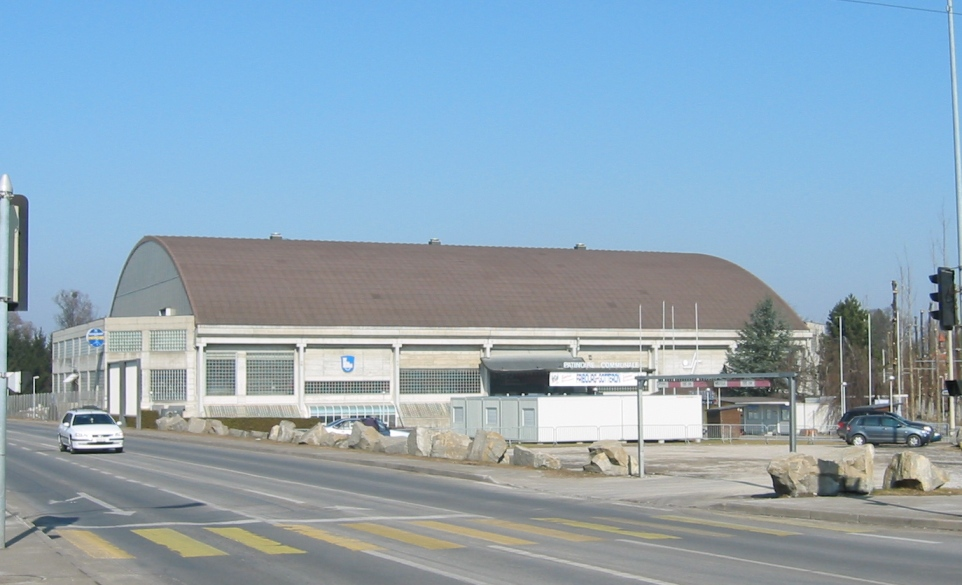 Patinoire de St. Leonard von aussen